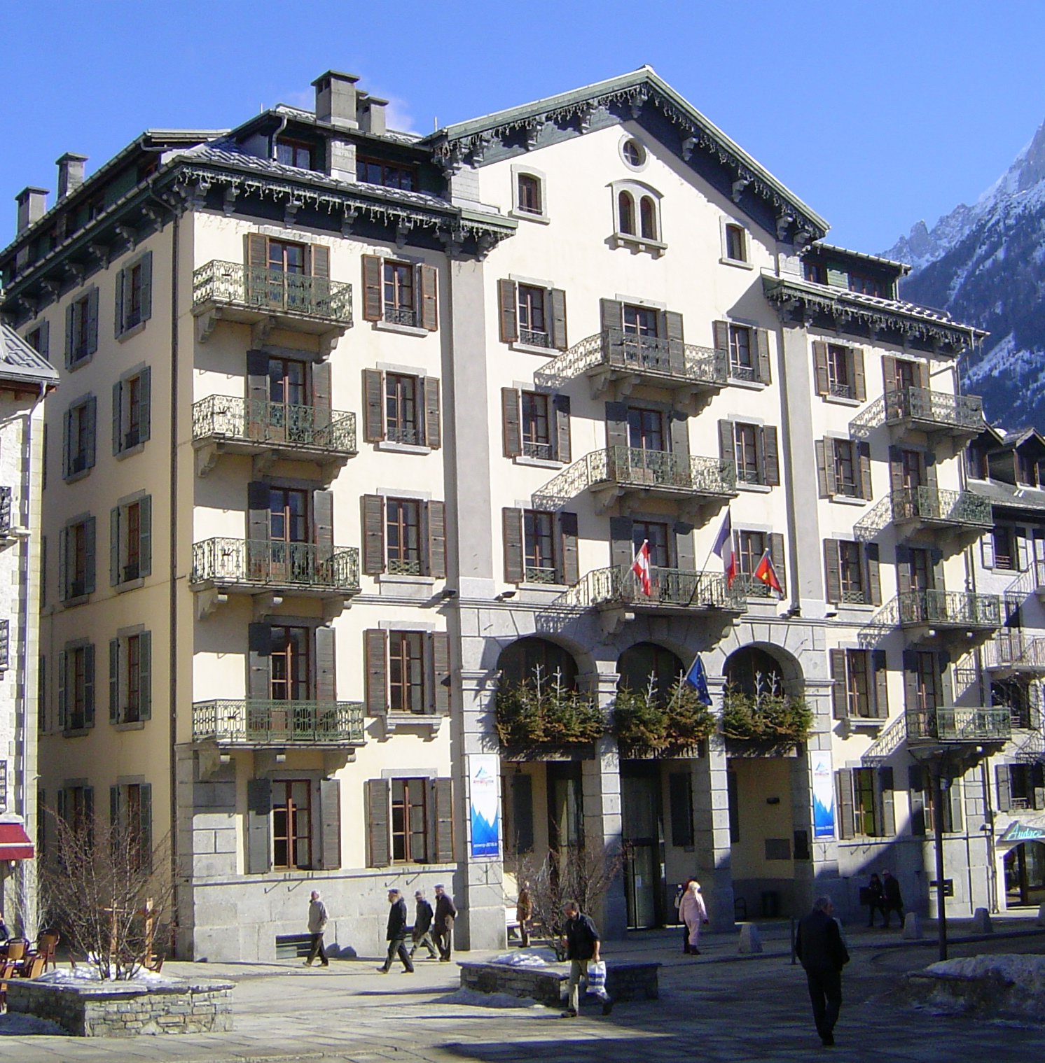 Photos prise dans la commune de Chamonix-Mont-Blanc en France